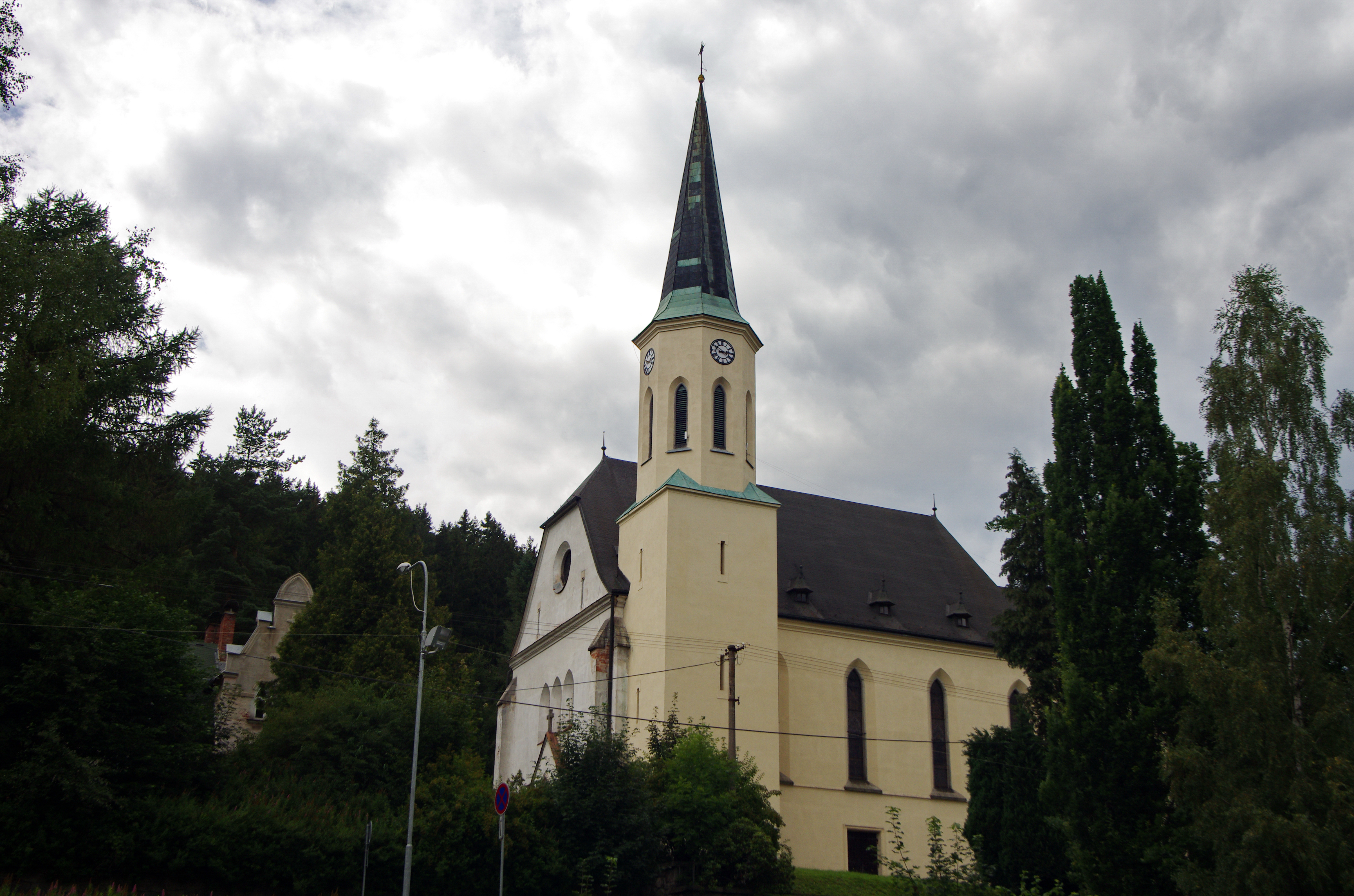 Stříbrná, okres Sokolov, kostel Nejsvětějšího Srdce Páně